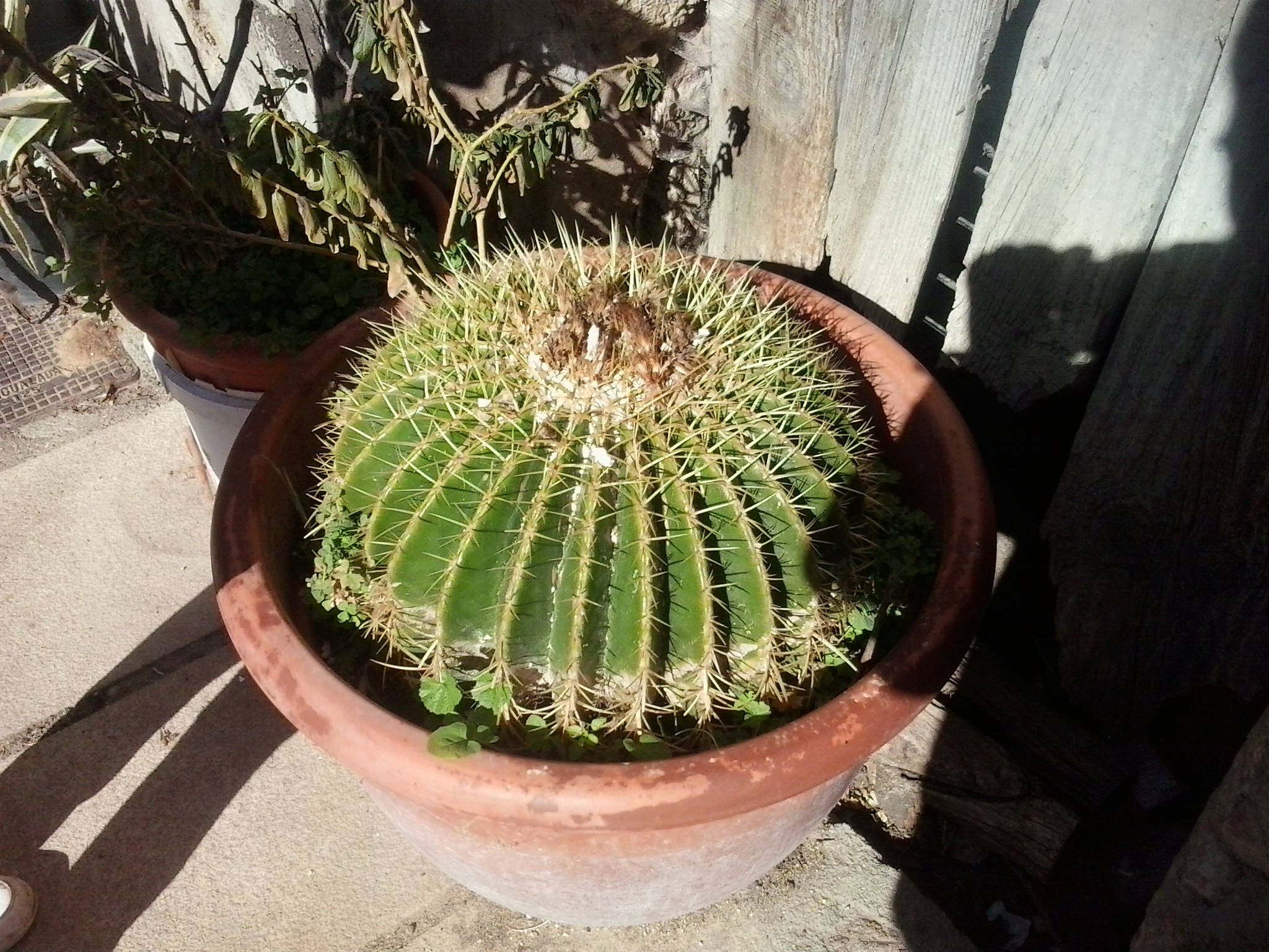 Enorme cáctus en Cuacos de Yuste. Cáceres.